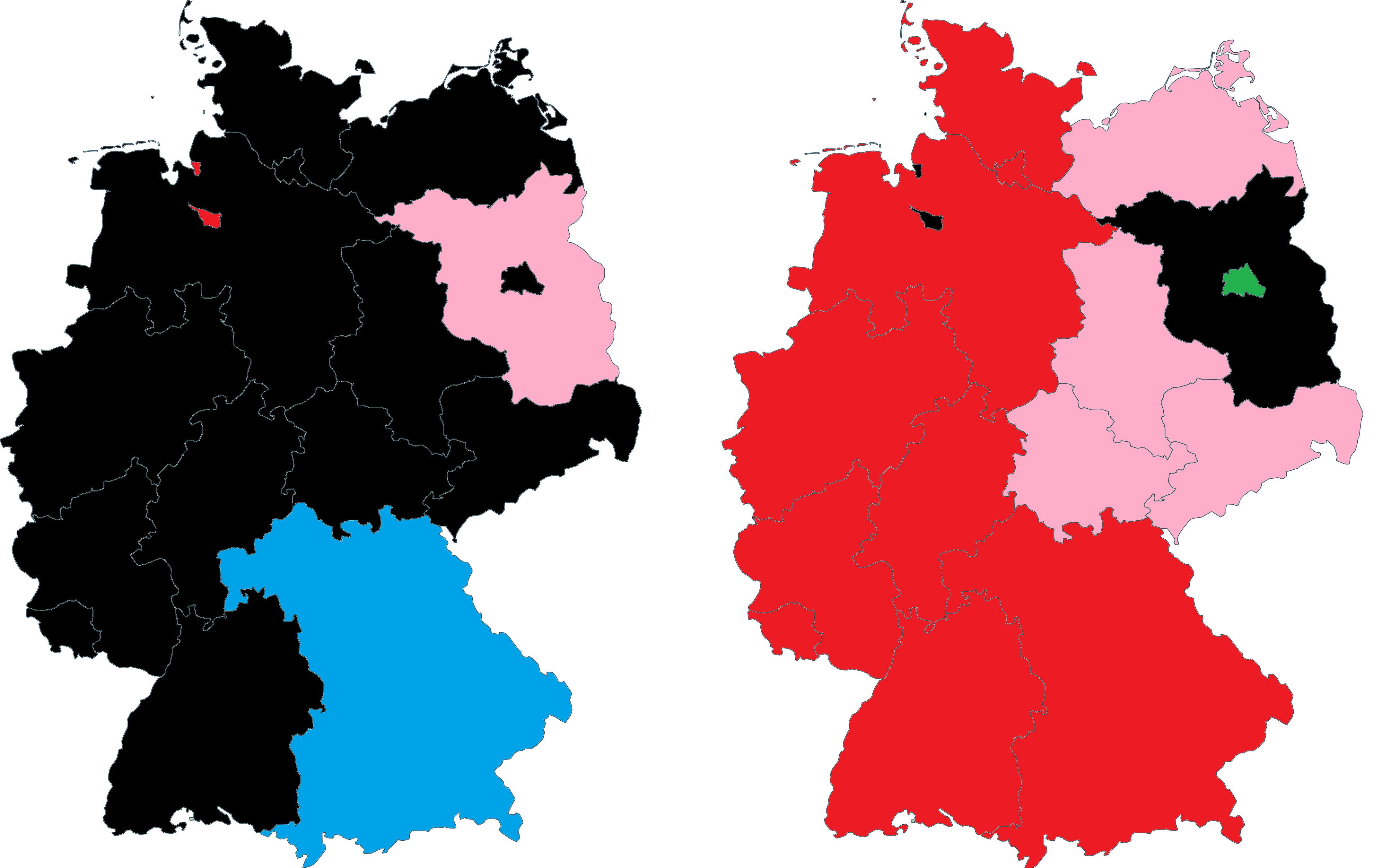 Elections européennes de 2004 en Allemagne, parti arrivé en tête par Land (1ère carte), parti arrivé en seconde position (2ème carte) Rouge : SPD Noir : CDU Bleu : CSU Rose :PDS Vert : Alliance90/Les Verts